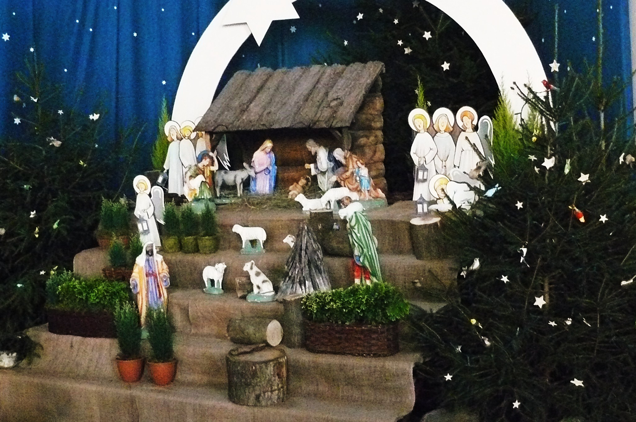 Szopka w kościele św. Stan. Kostki w Poznaniu - 2014r.